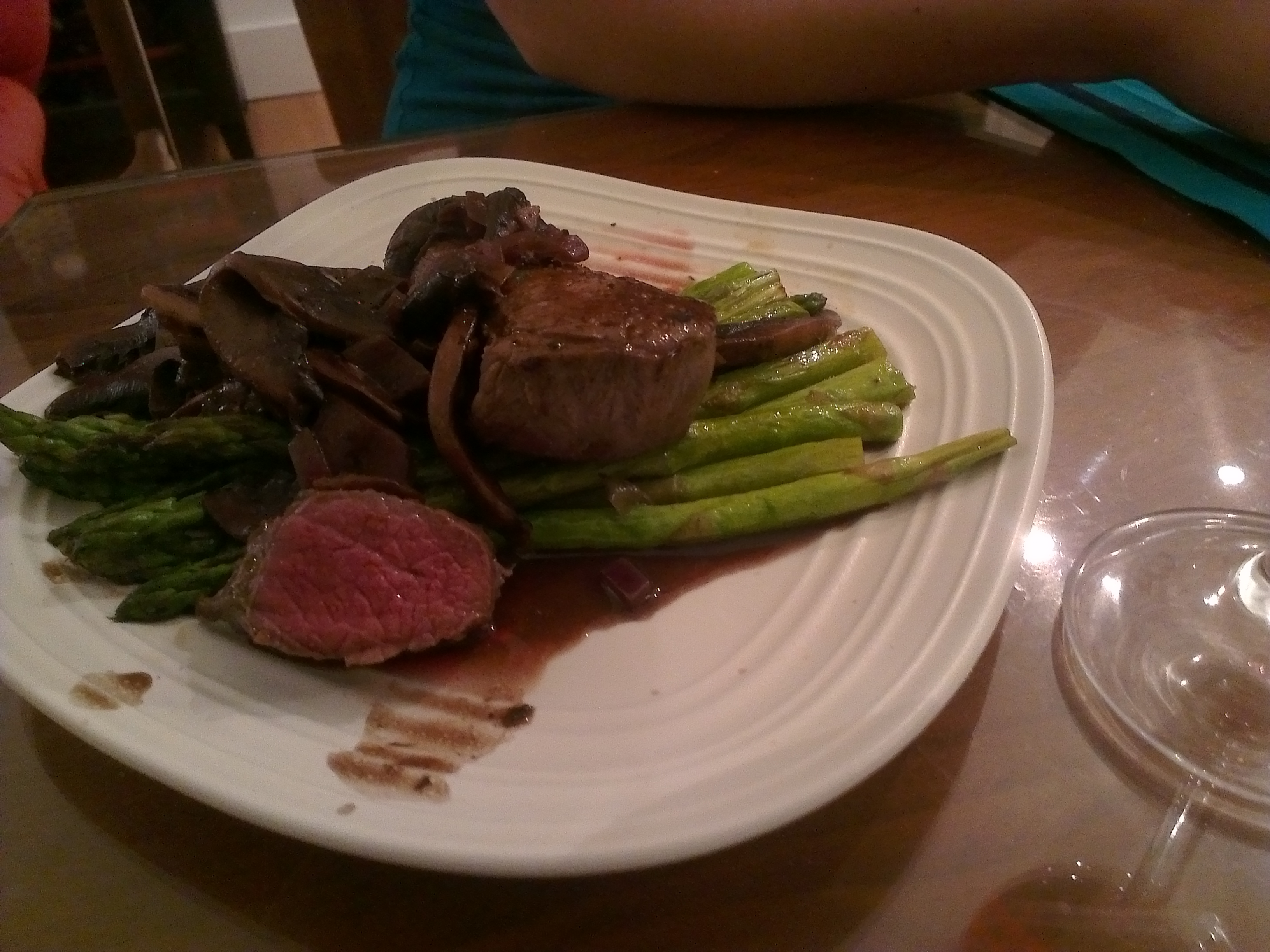 Civet de chevreuil aux asperges et aux champignons